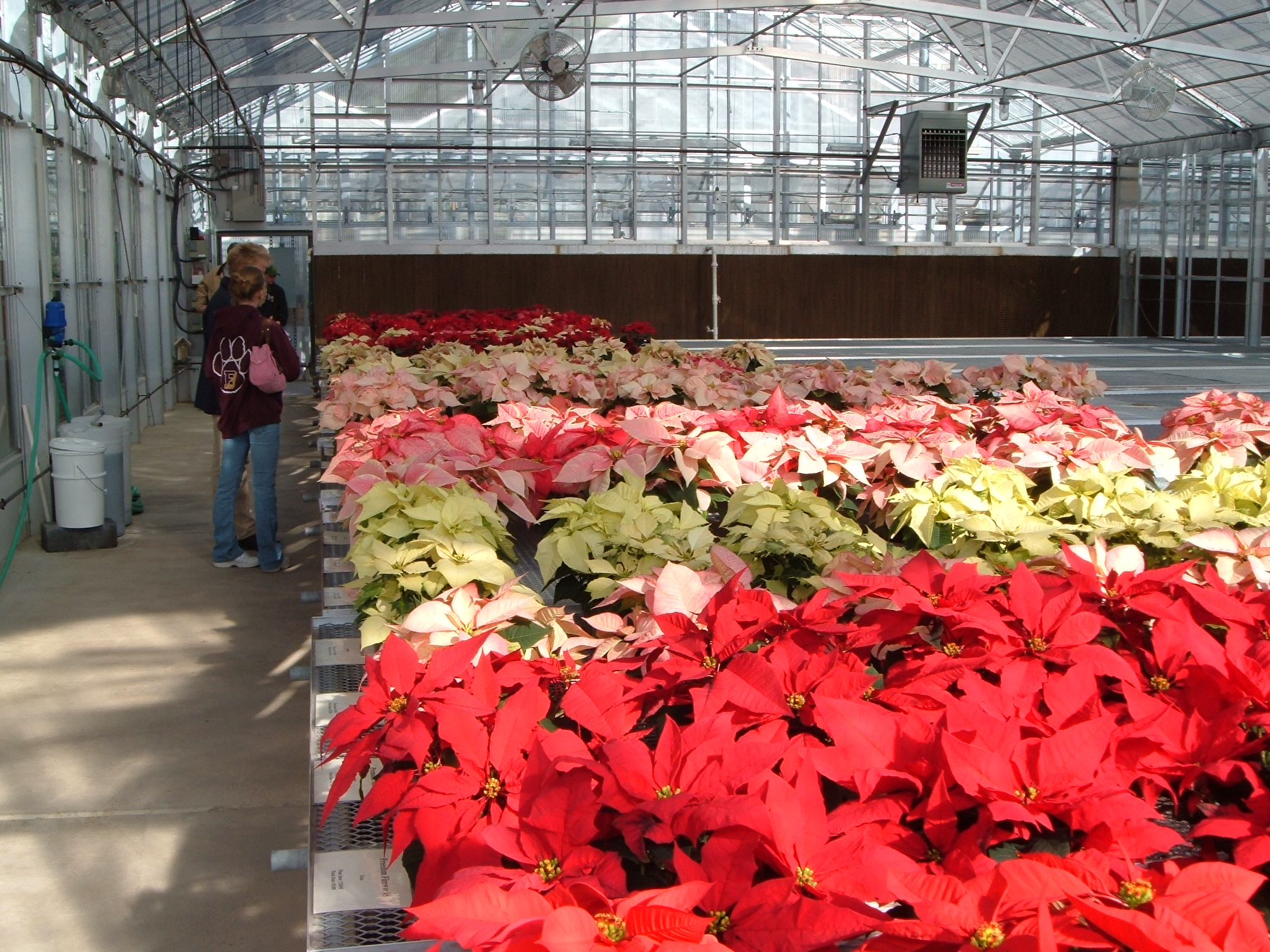 Pointsettia 14